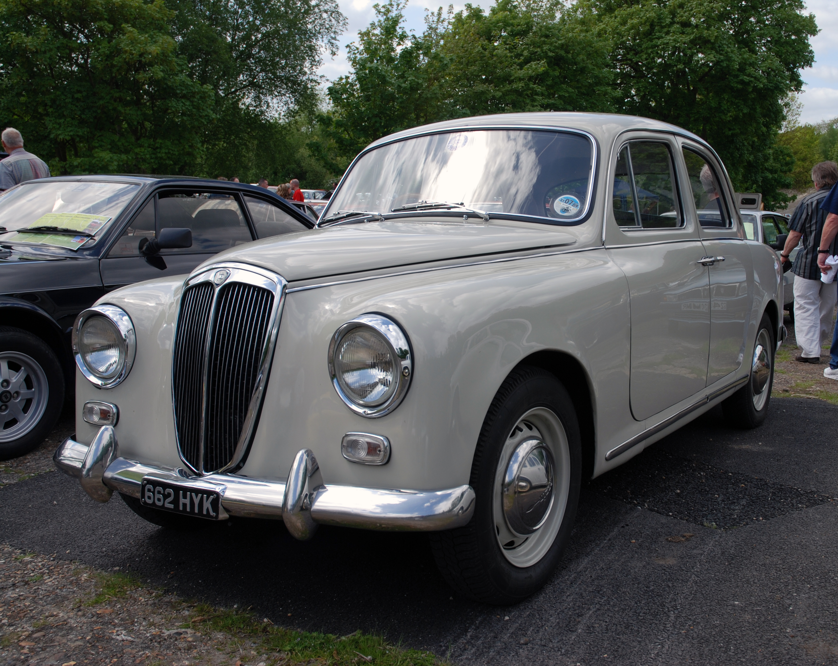 Brooklands,May 2009